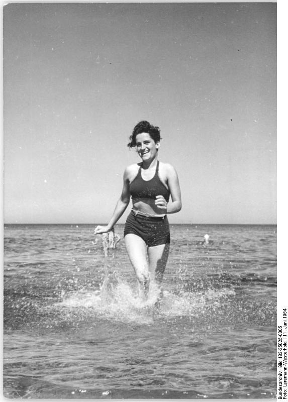 Zentralbild Levermann-Westerhold 11.6.1954 Sommer - Sonne - Ostseestrand In den Ostseebädern hat die "Saison" begonnen. Die Werktätigen haben die Ferienheime bezogen, die ersten Salzwasserbäder genommen und auch den ersten Sonnenbrand mitbekommen. Für die Kinder ist die herrliche Zeit des Buddelns im weissen Sand und des Plantschens gekommen. UBz: Sie war natürlich nicht die einzige, die sich in der "Vorsaison" ins noch kühle Nass wagte. Aber sie war die einzige, die sich dabei fotografieren liess (Graal-Müritz)